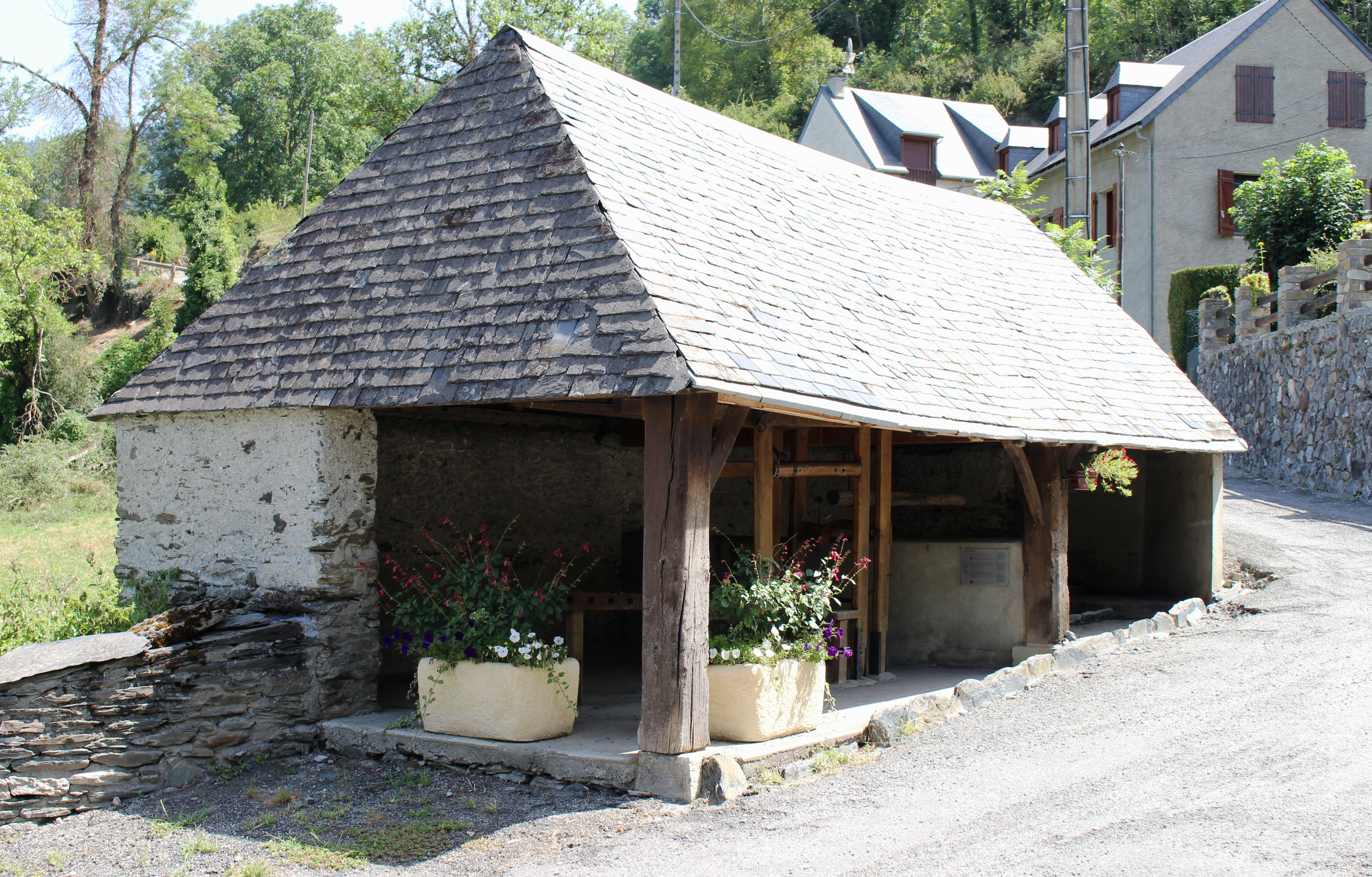 Lavoir de Bourisp (Eglise) (Hautes-Pyrénées)